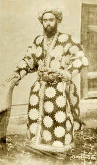 Астанкул-бий - Кушбеги и главный закятчи Бухарского эмирата